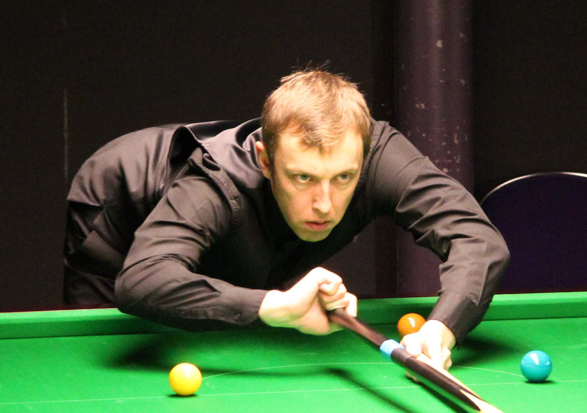 Andrew Higginson beim Paul Hunter Classic 2011